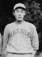 早稲田大学時代（1921年）の久慈次郎